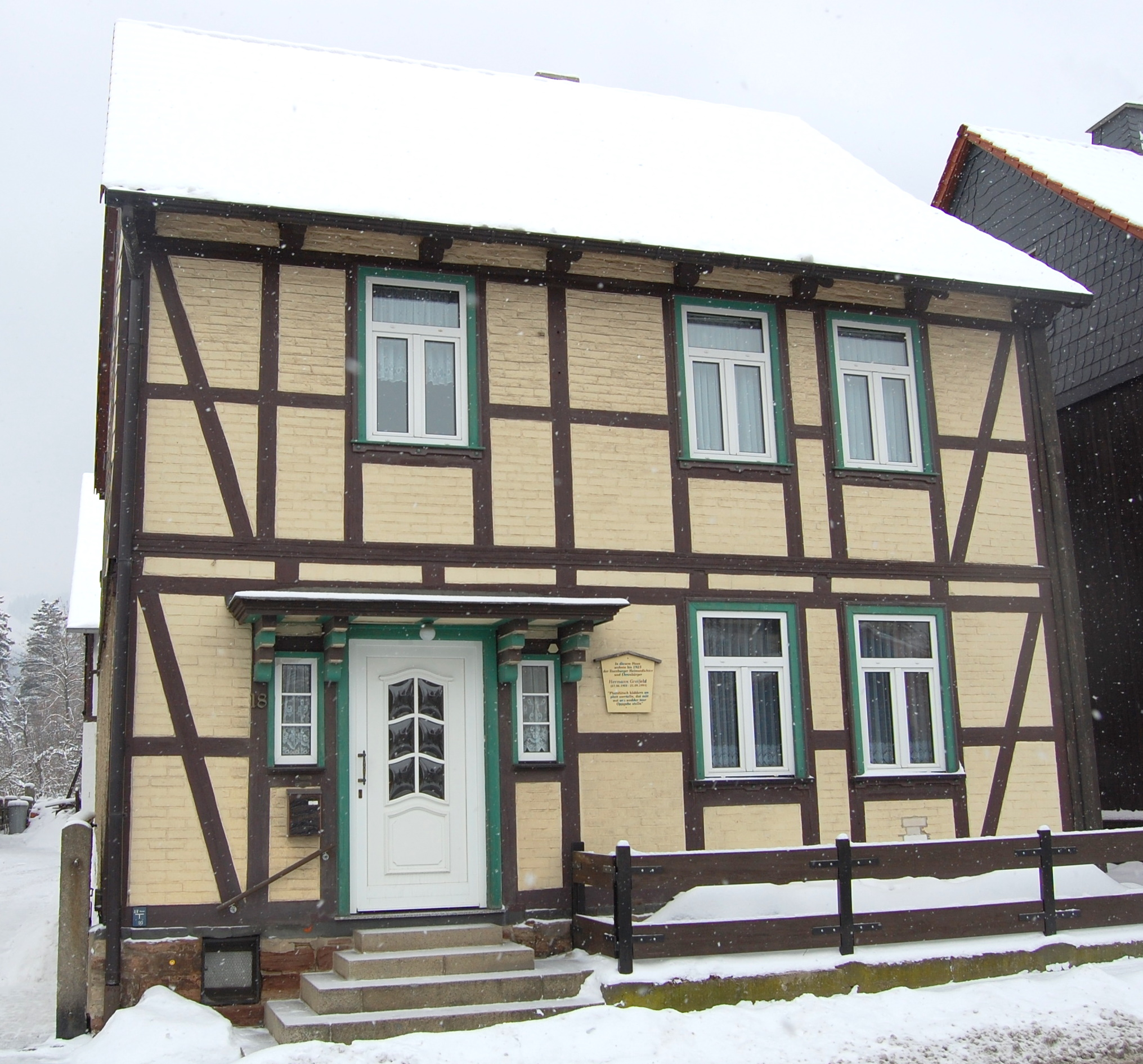 Wohnhaus von Hermann Greifeld (1901-1991) in Ilsenburg, der Heimatdichter lebte hier bis 1923